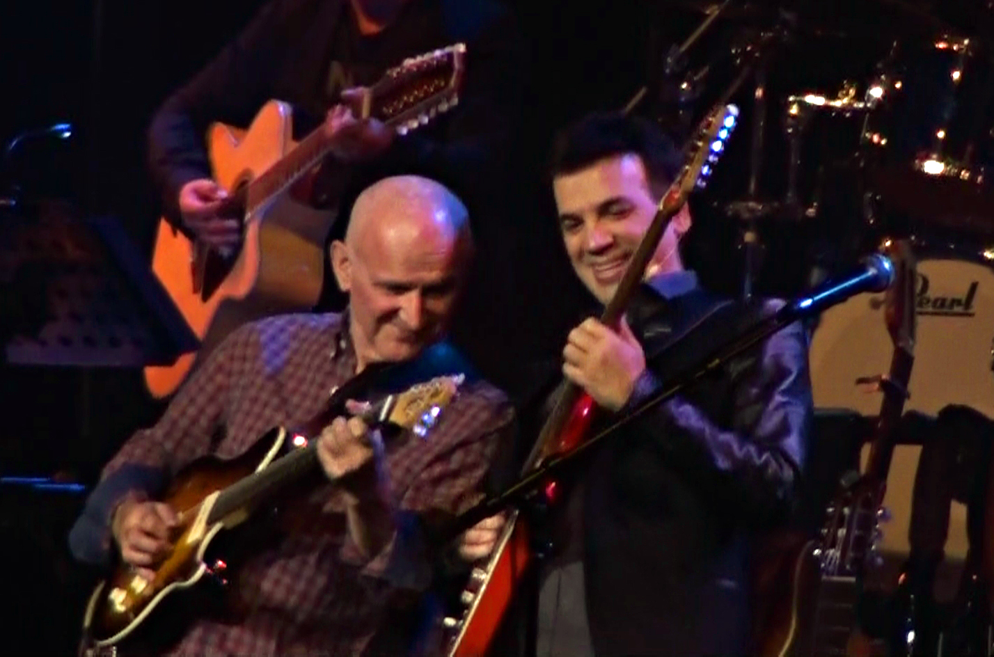 Tournée 2015 « Autour de la guitare » qui réunit autour de Jean-Félix Lalanne de grand musiciens comme Dan Ar Braz. Concert le 16 octobre 2015 au Liberté à Rennes.